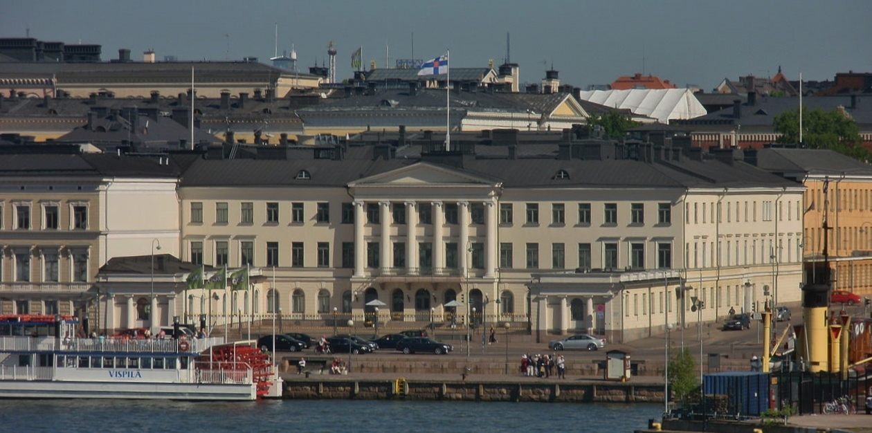 Presidential Palace in Helsinki